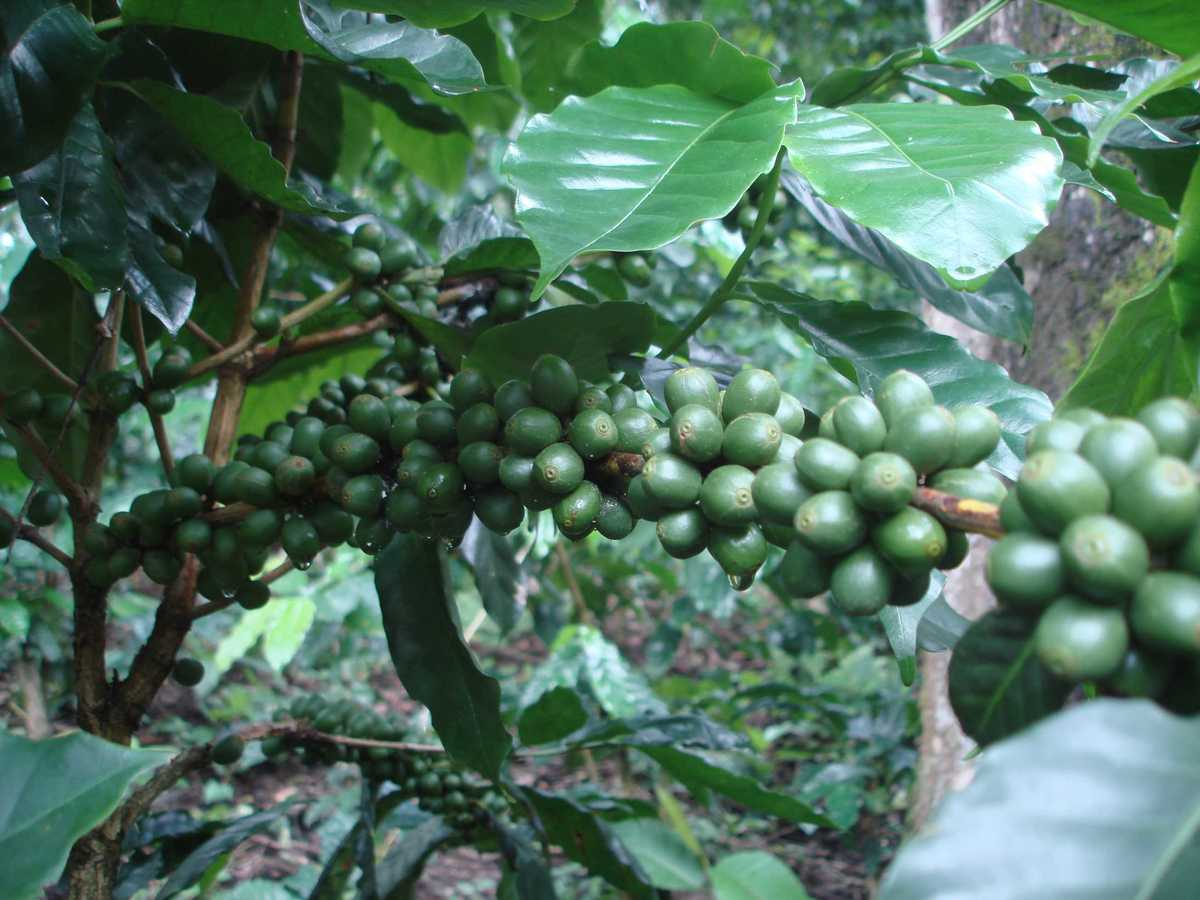 Cafe de calidad en el municipio por sus optimas condiciones